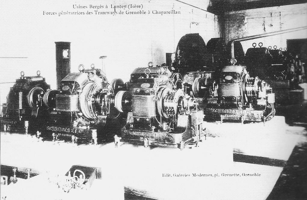 Usine de production d'hydroélectricité d'Aristide Bergès à Lancey, près de Grenoble (France).